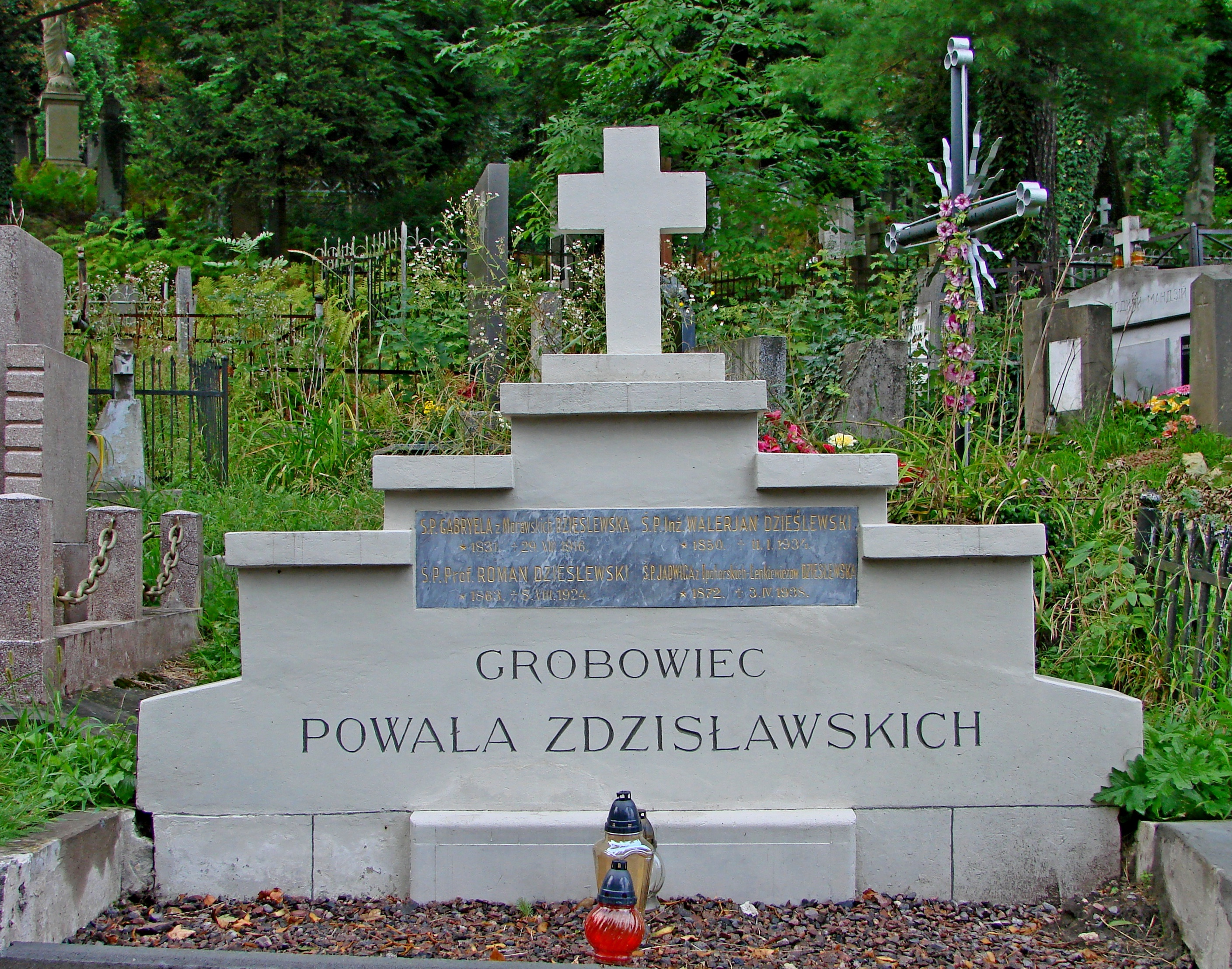 Гробівець родини Дзеслевських.Личаківський цвинтар , поле № 50.